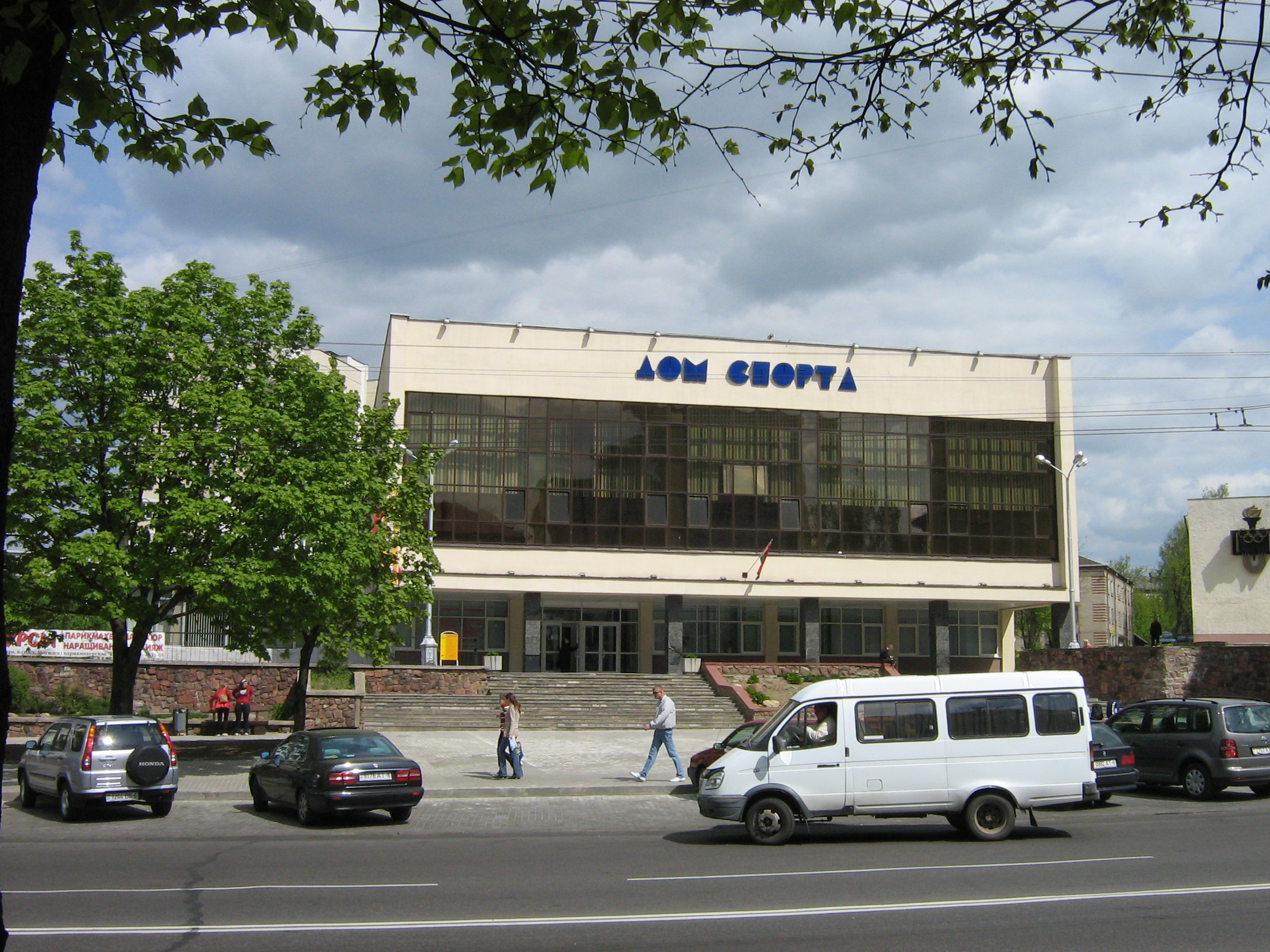 Дом спорта